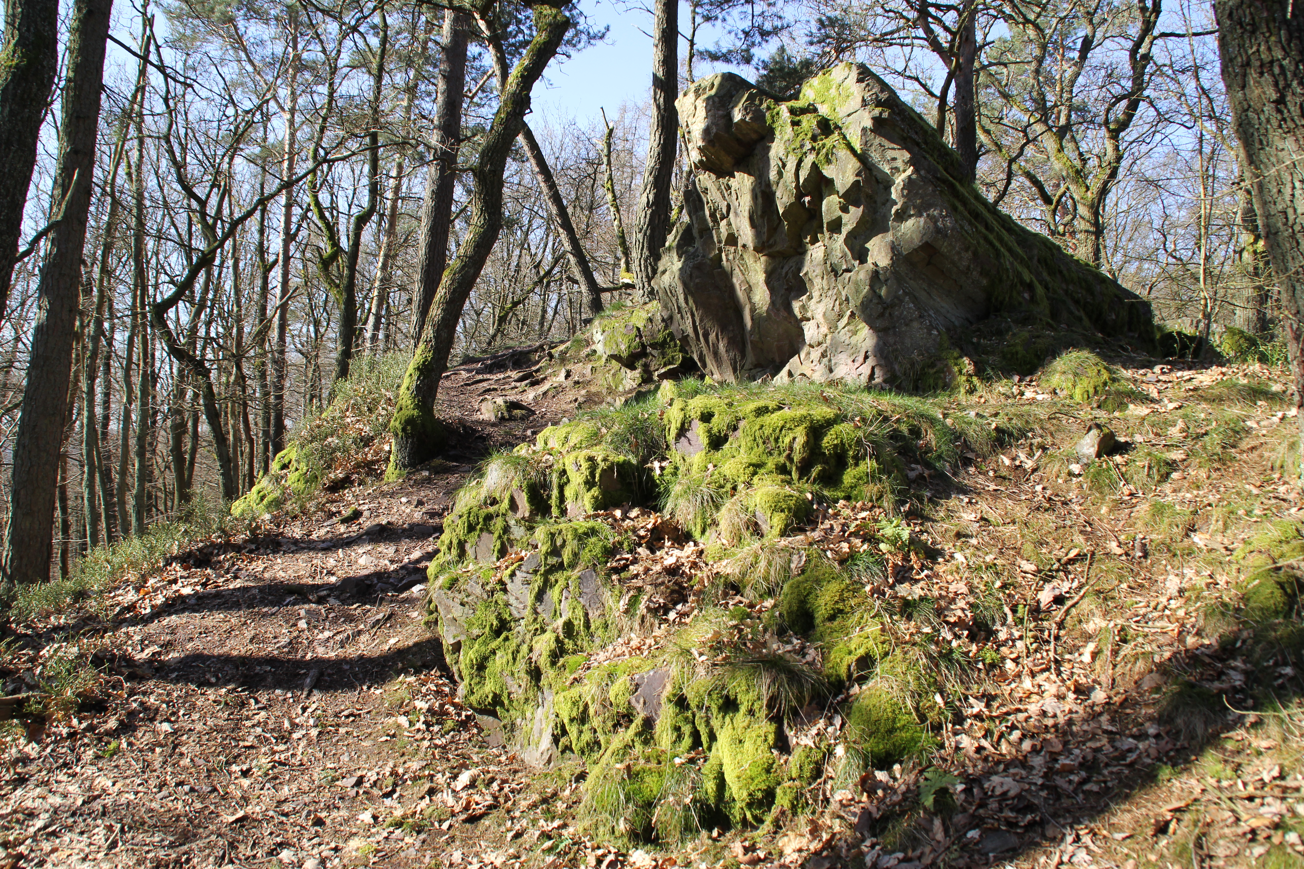 Felsen am Gipfelweg am Hahnenkamm im Spessart, bei Alzenau, Bayern